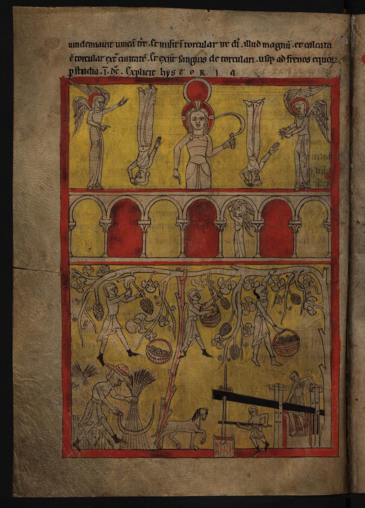 Apocalipse do Lorvão, Colheita e Vindima (fl. 172v).